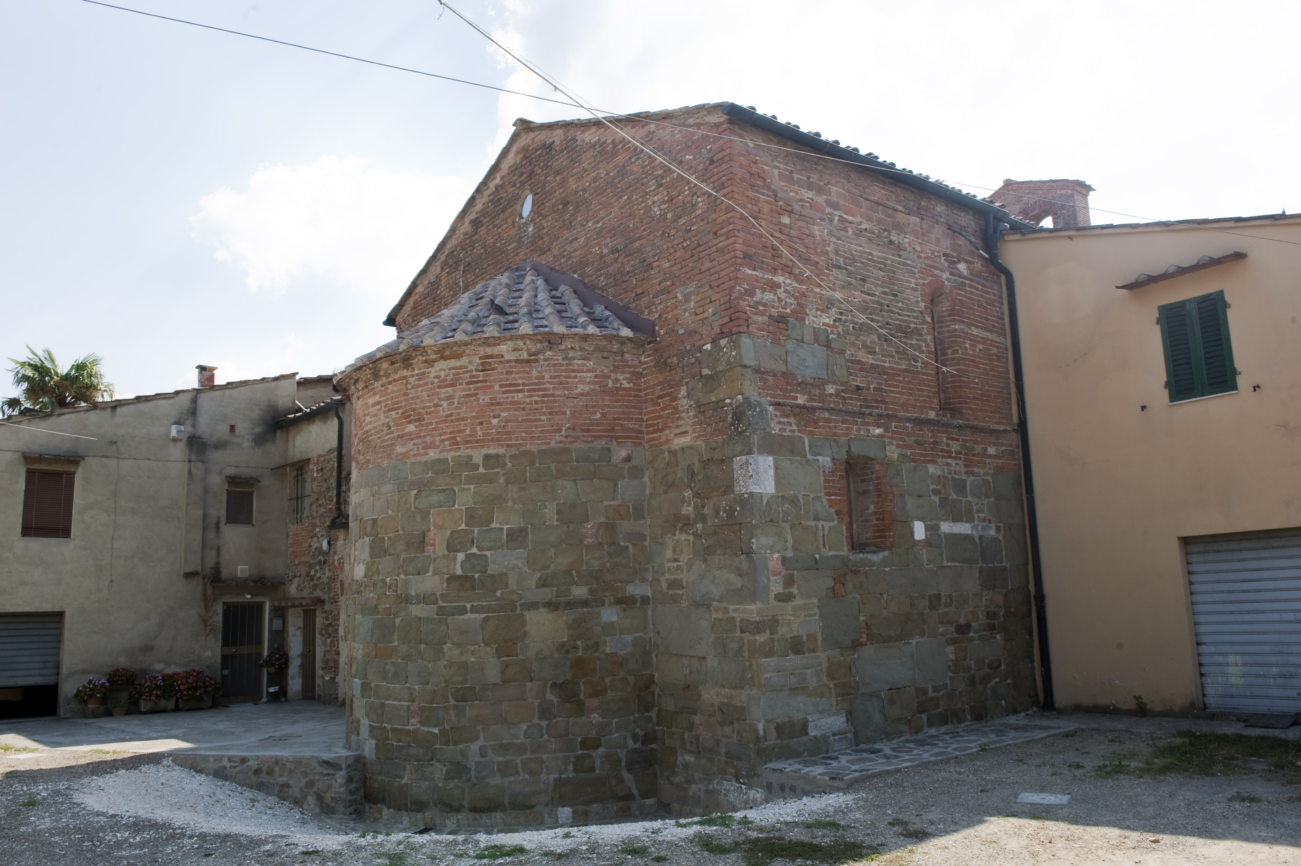 Abside della Chiesa di San Martino a Pontorme, Empoli